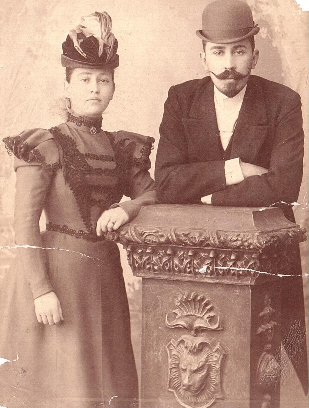 Пётр Карлович Гран (18 ноября 1869 — 1941, Бухарест), российский государственный деятель, иркутский и томский губернатор и его жена Евгения Владимировна, урождённая Волкова (25.10.1869—?)